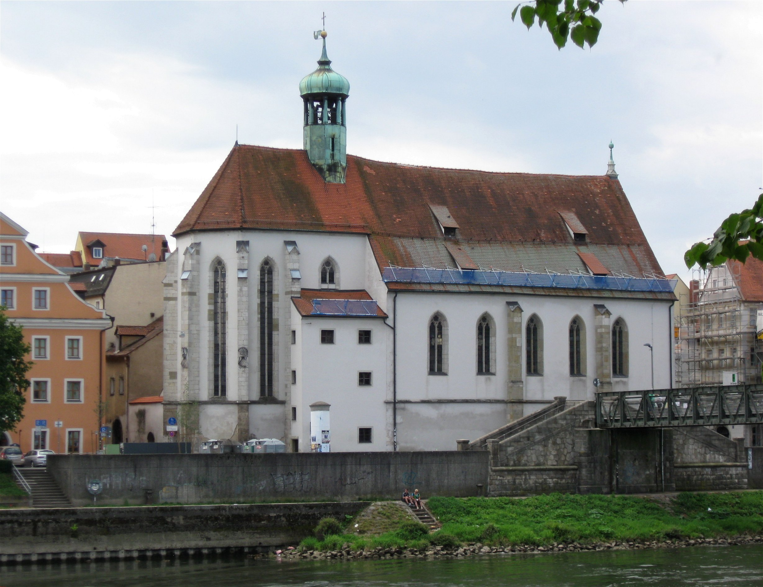 Weißgerbergraben 1; Weißgerbergraben 3. Evang.-Luth. Kirche St. Oswald, ehem. Spitalkirche, Saalkirche mit eingezogenem Polygonalchor, im Kern Ende 13. Jh., Chorneubau 1. Viertel 14. Jh., 1604 erweitert, Barockisierung 1708 und 1750, westliche Vorhalle und Dachreiter 1908 von German Bestelmeyer; mit Ausstattung.